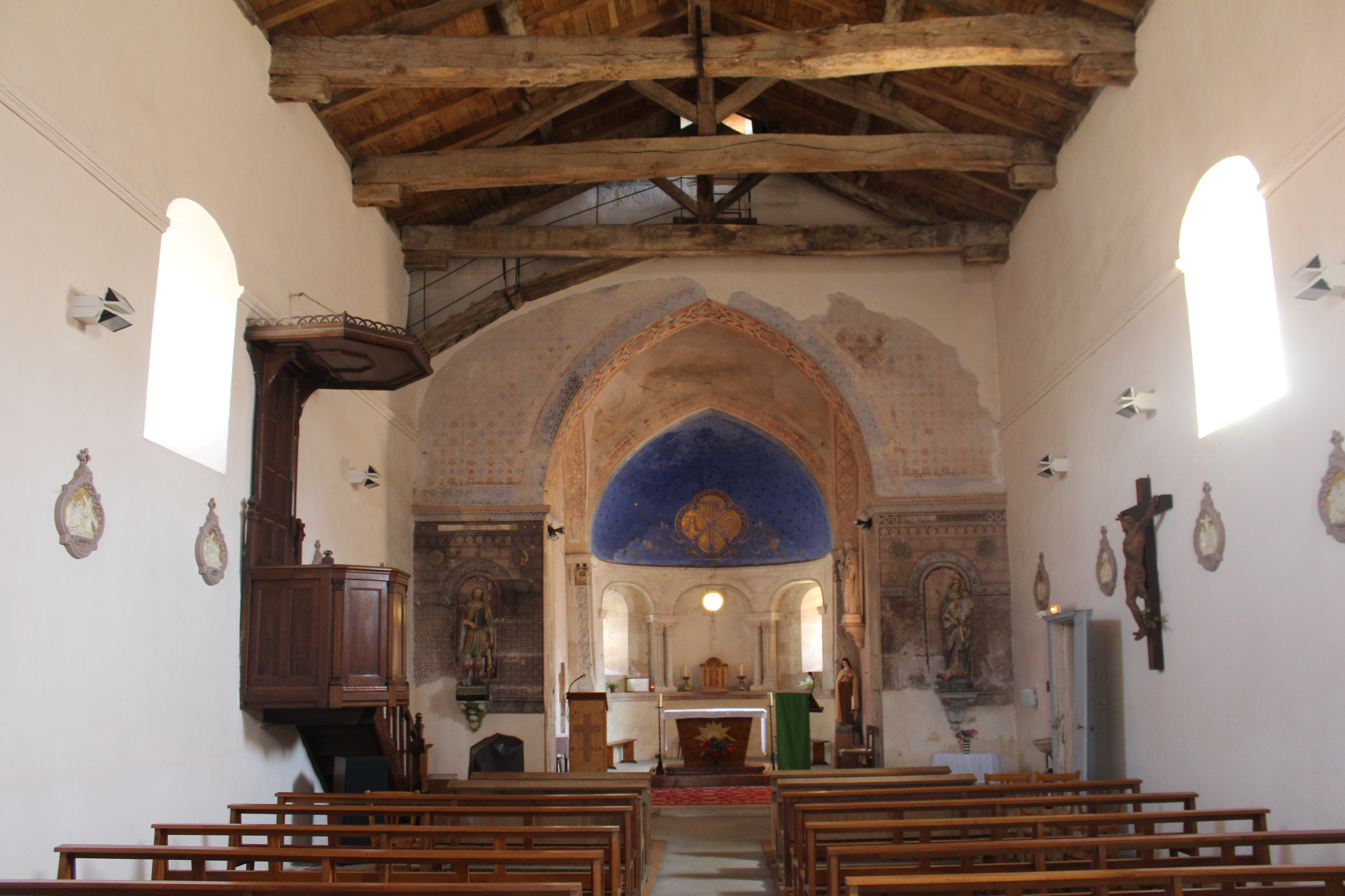 Église Saint-Julien de Saint-Julien-sur-Veyle.